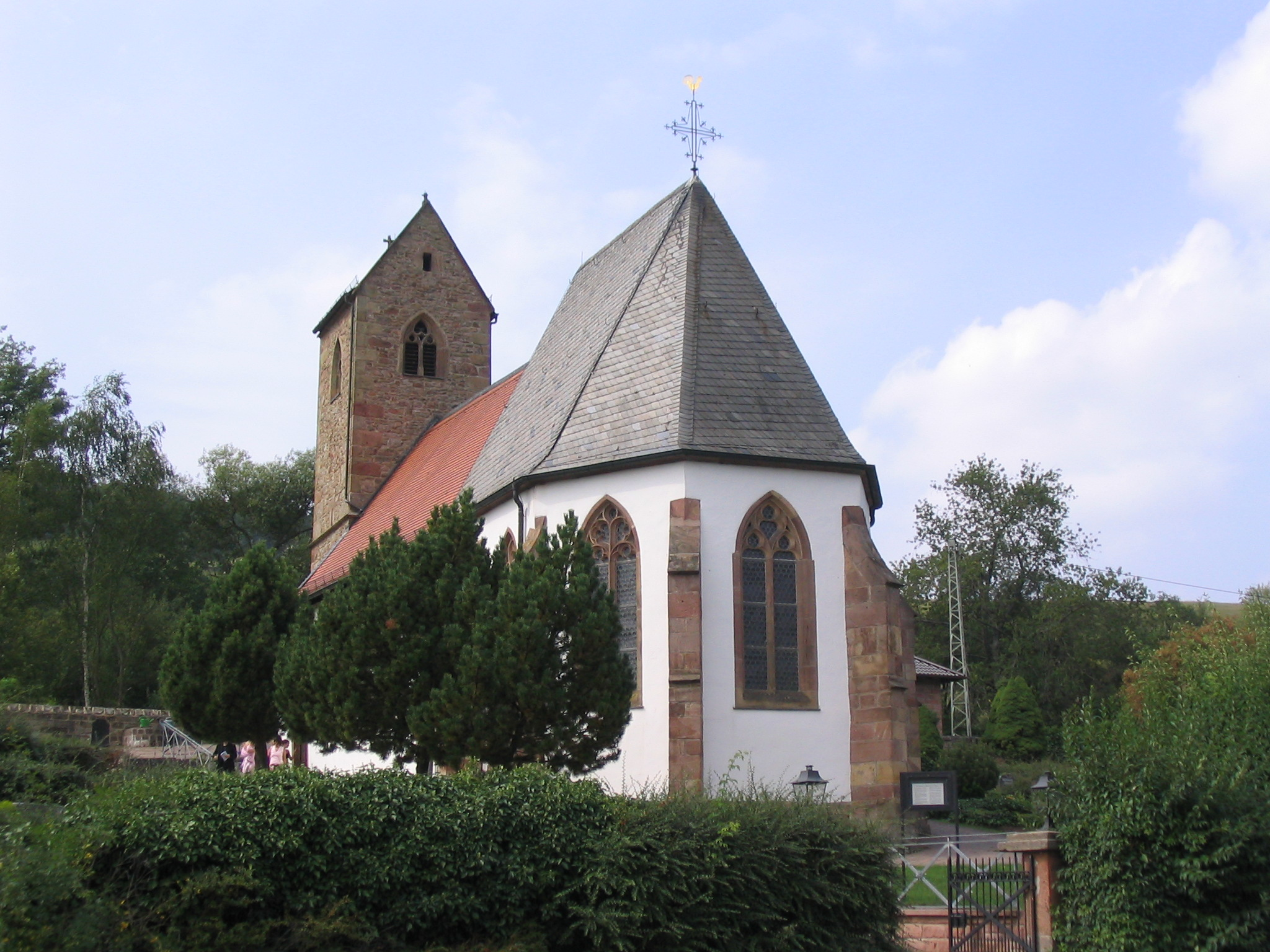 Zweikirche zu Rutsweiler an der Lauter im September 2005. Quelle: Marco Creutz